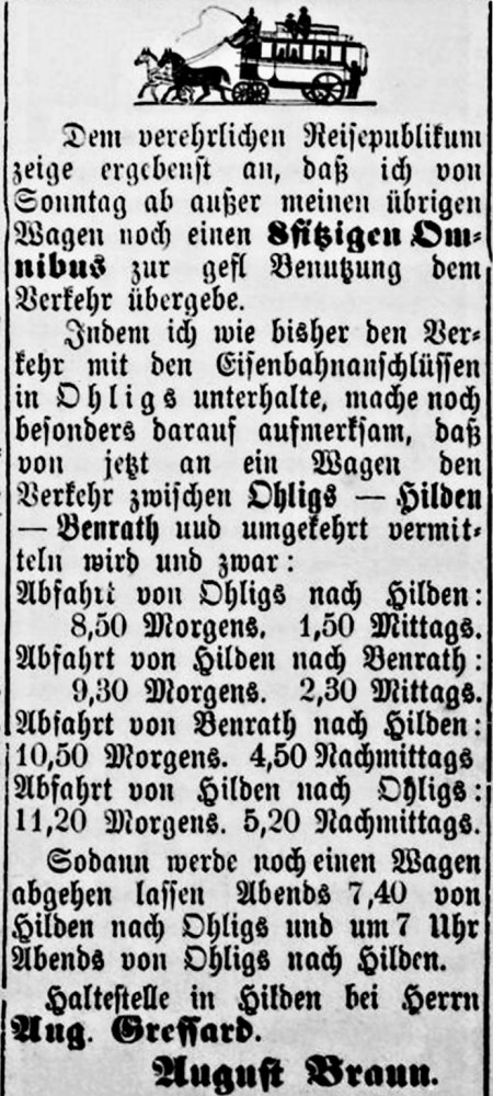 Fahrplan August 1877 Pferdeomnibus vom Gasthaus Krone Hilden zu den umliegenden Bahnhöfen